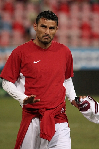 Eugen Trică